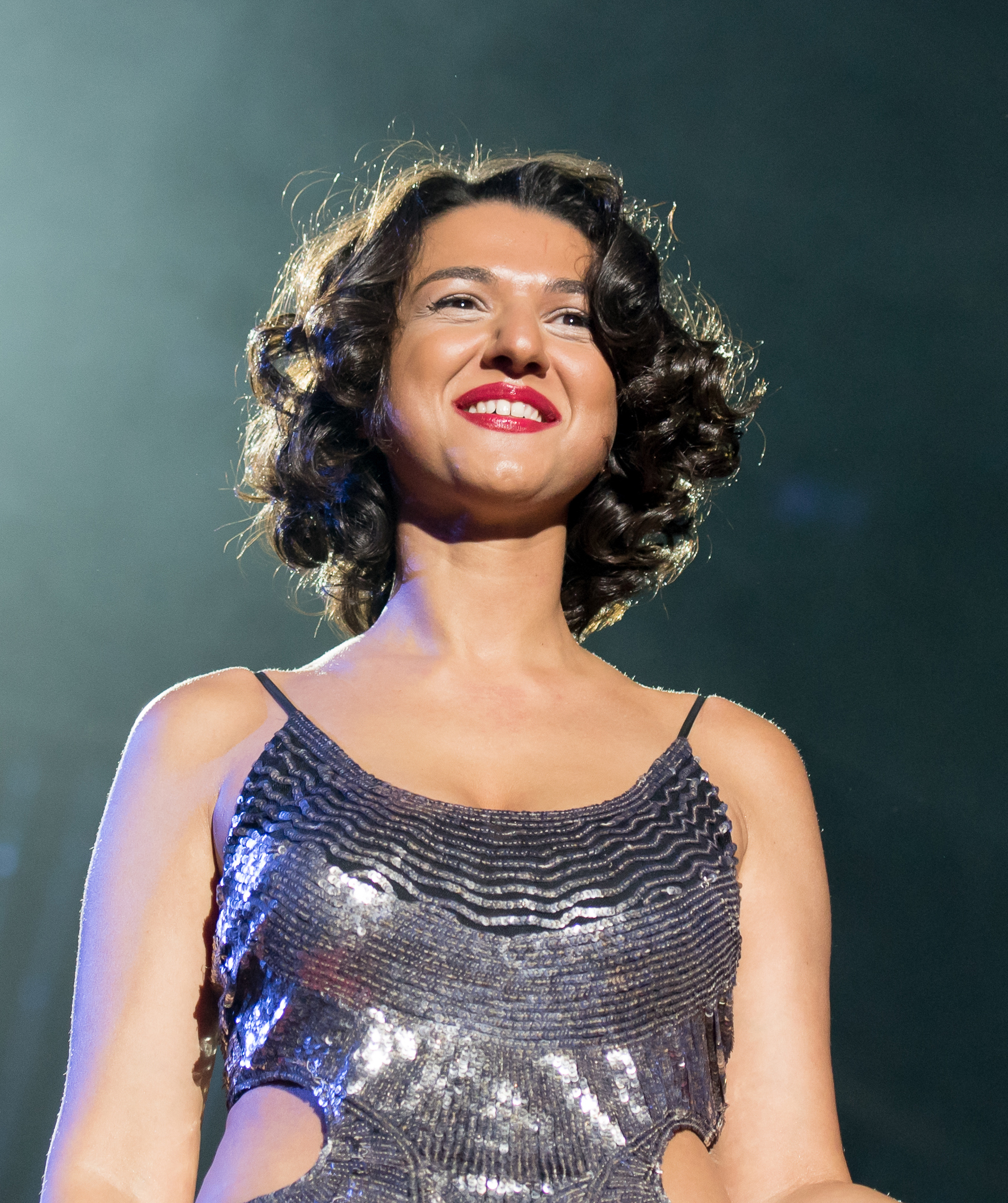 Khatia Buniatishvili beim Global Citizen Festival in Hamburg